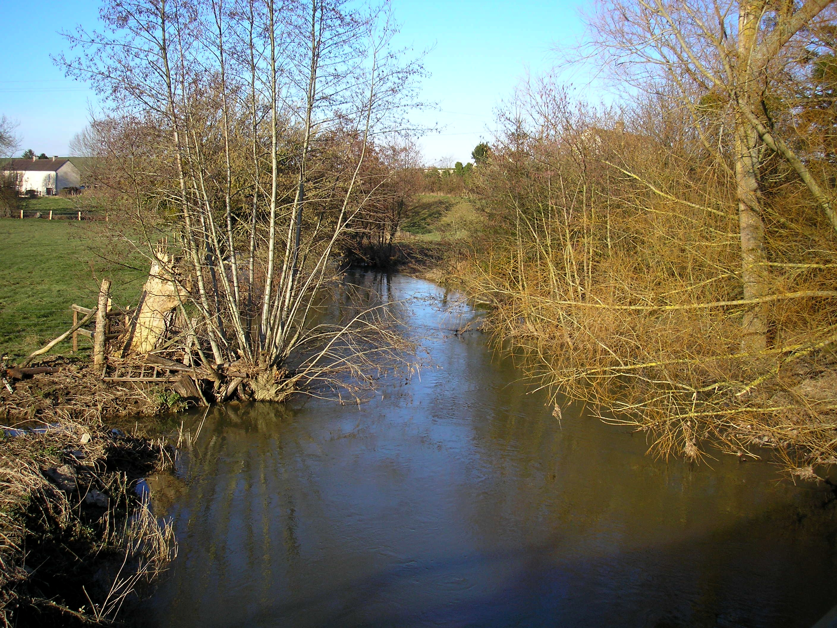 La Seulles au Pont Roch, entre Bucéels et Audrieu (Normandie, France).